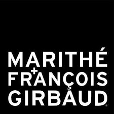 logo de la marque Marithé François Girbaud